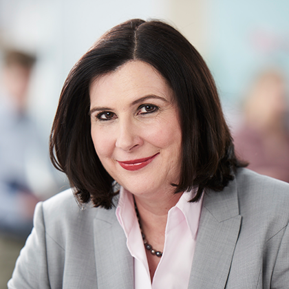 Prof. Dr. Claudia Schmidtke, MdB (2017)